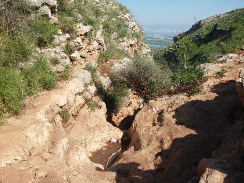 ערוץ נחל יצפור, גלבוע, Itzpor Valley, Gilboa, Israel